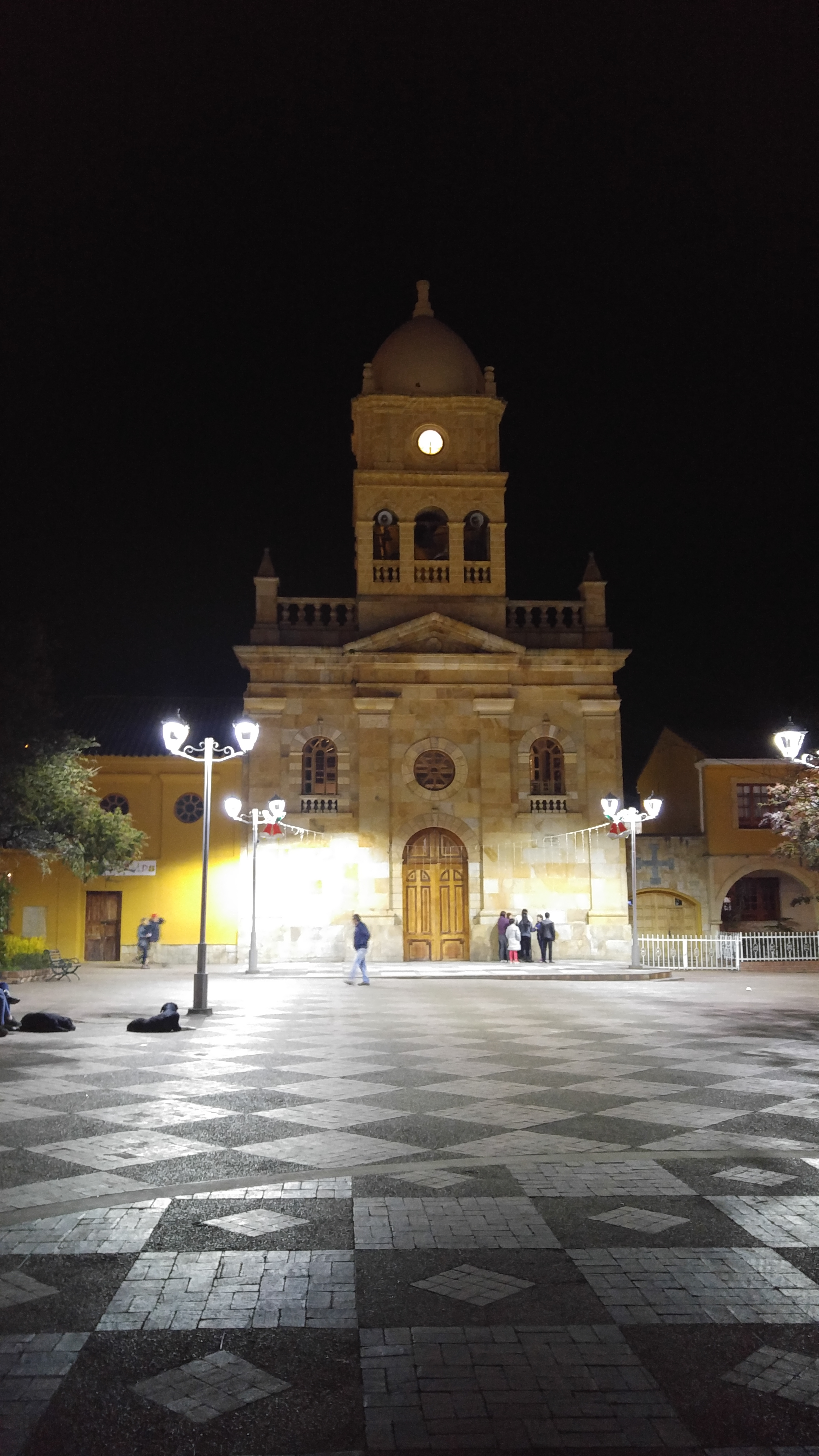 Iglesia Nuestra Señoar del Rosario del Municipio de La Calera, Cundinamarca